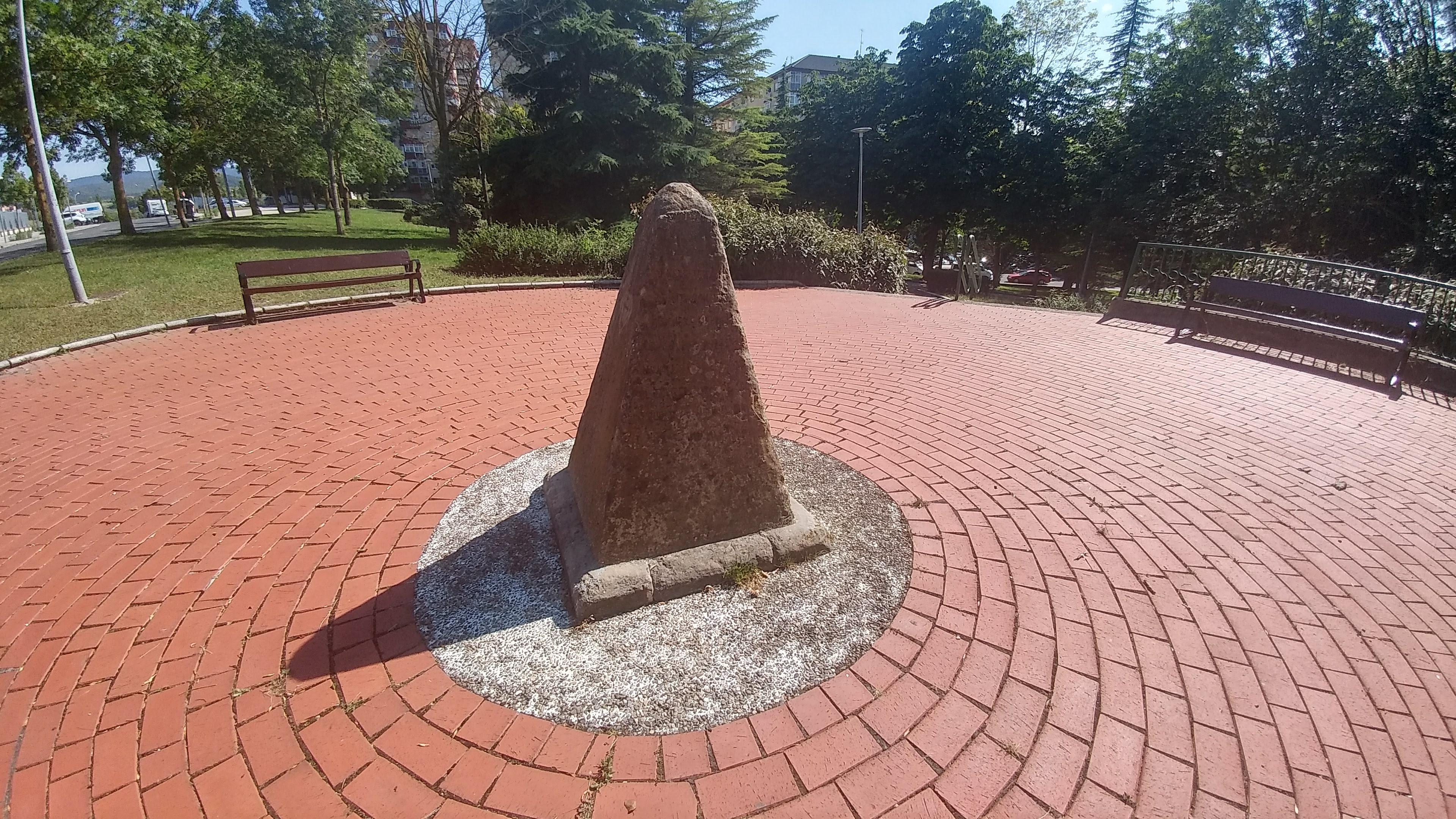 1860an izandako eklipsea ikustera joan zirenen oroitzeko monolitoa. Gasteizko Astronomo kalean.